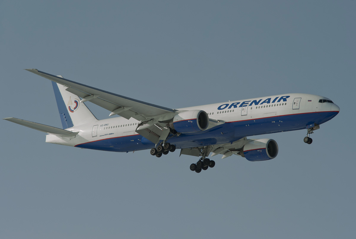 Orenair Boeing 777-2Q8/ER VQ-BNU